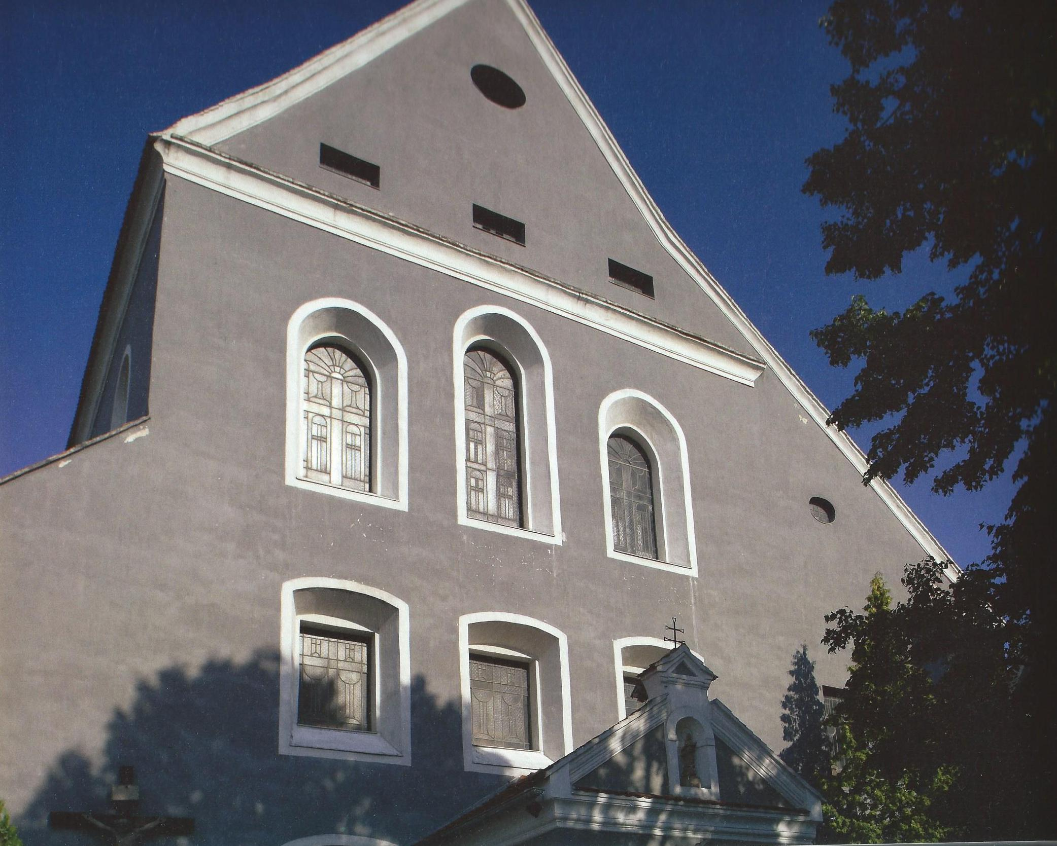 Kostol v Malackách